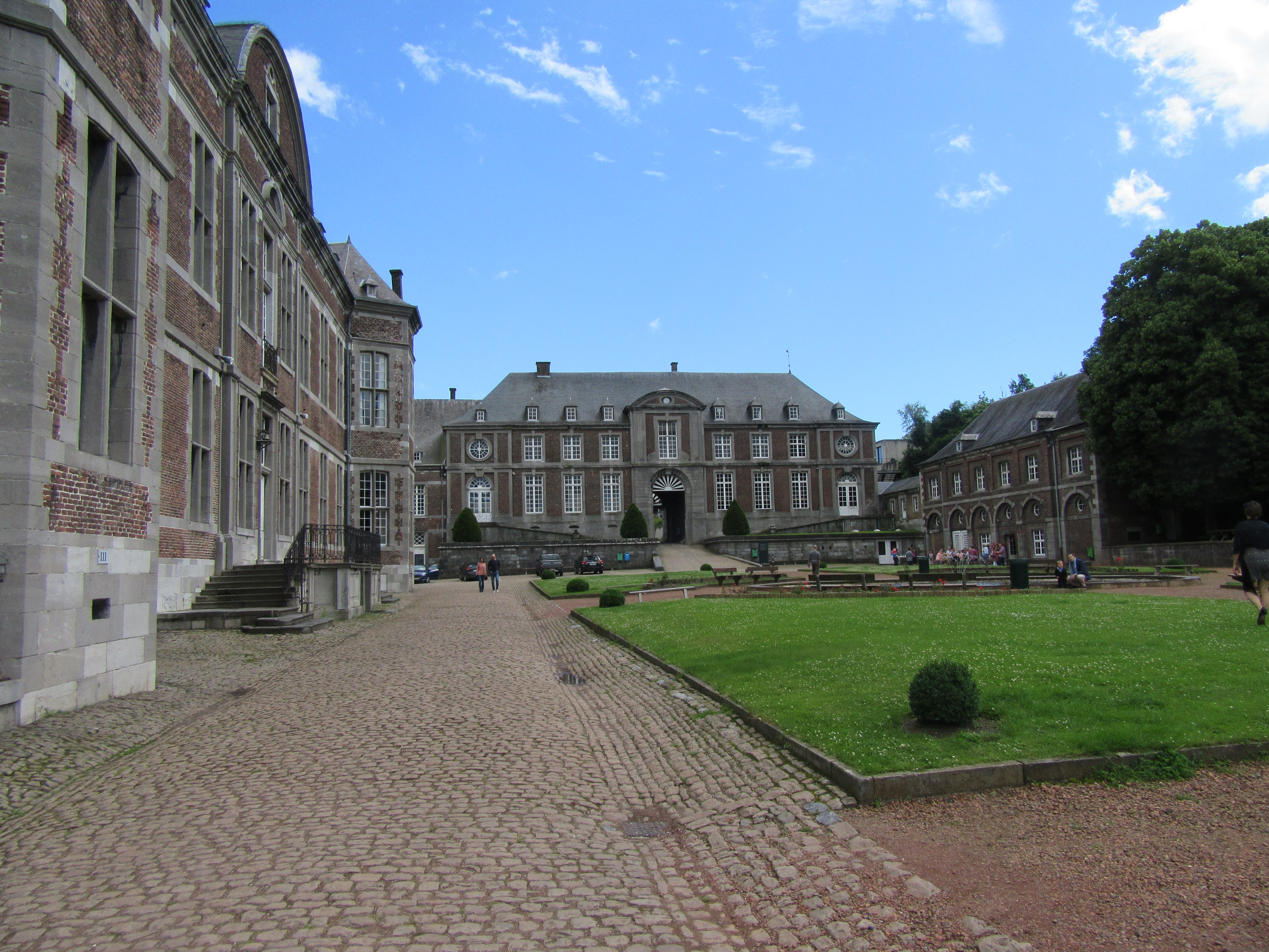 Au fond quartier abbé Dufresne et à gauche quartier abbé Dartevelle à l'abbaye de Floreffe